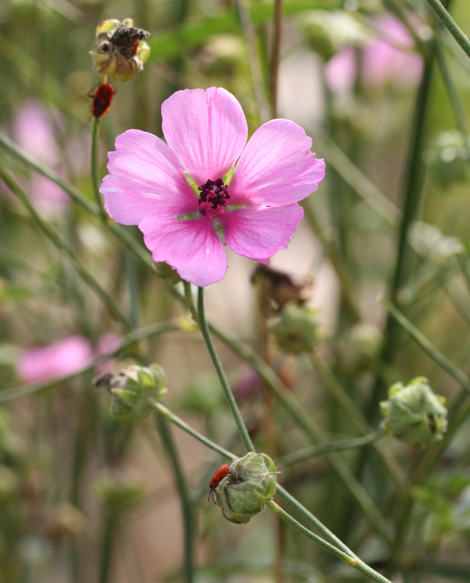 Althaea cannabina im Botanischen Garten Dresden